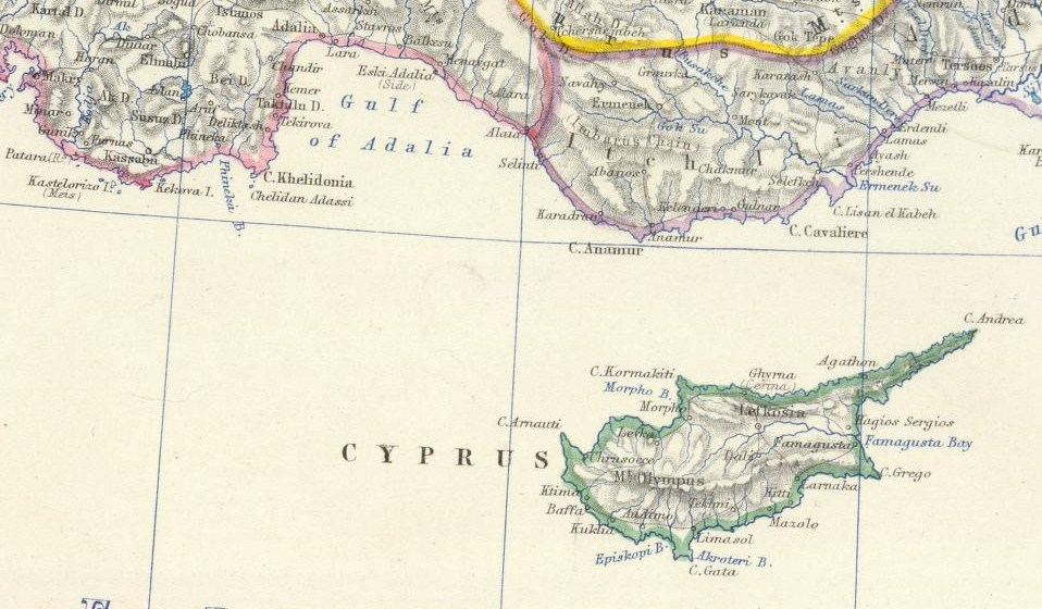 Cyprus and Asia Minor South Coast, cropped from "Turkey in Asia, Asia Minor, and Transcaucasia" by Keith Johnston, F.R.S.E. Engraved & printed by W. & A.K. Johnston, Edinburgh. William Blackwood & Sons, Edinburgh & London, (1861)